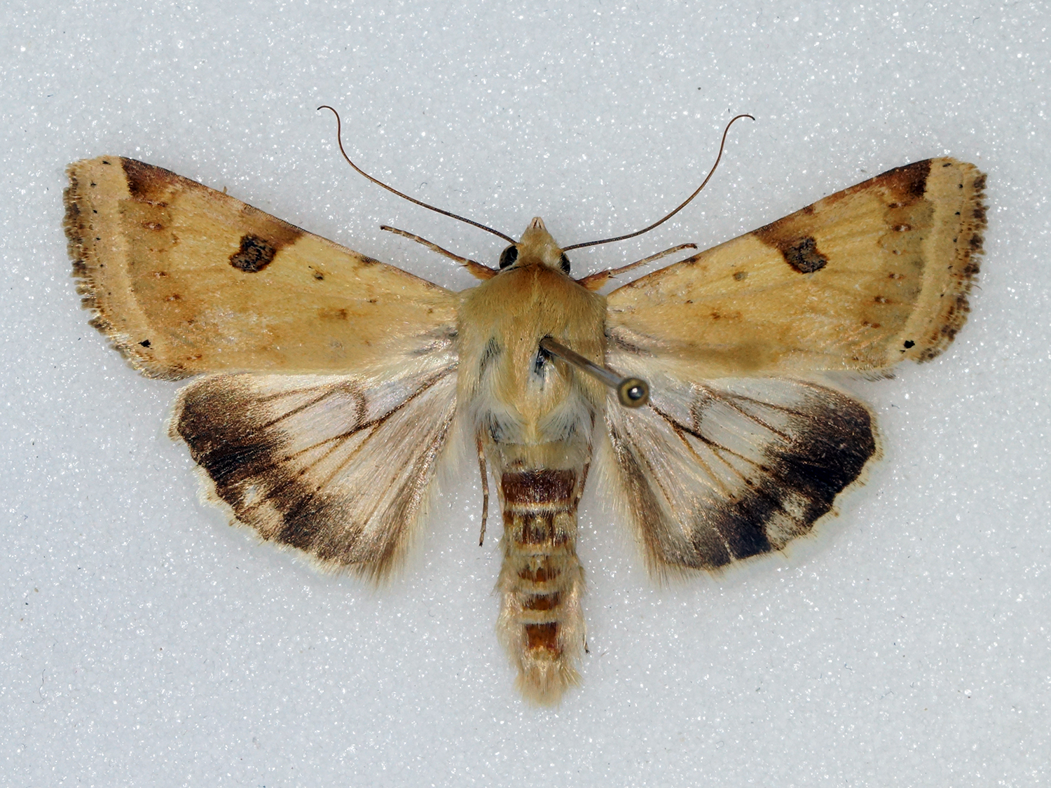 08-06-15 - Stevenage - Hertfordshire - UK